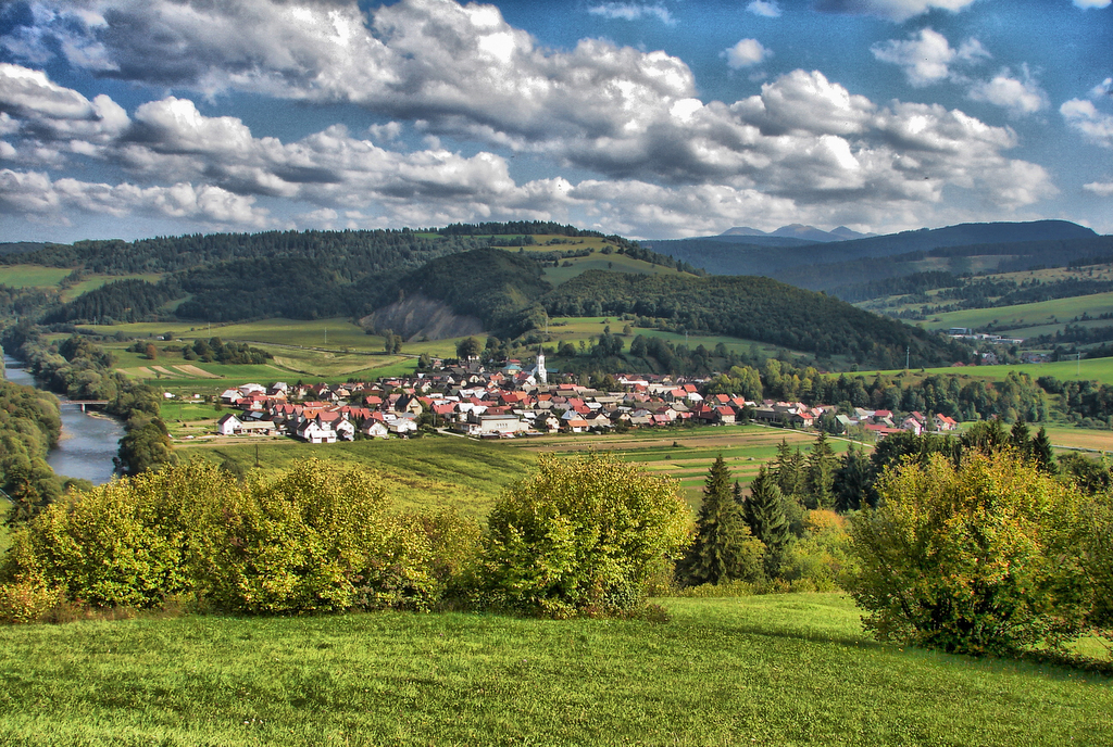 Pohľad na dedinu Krivá